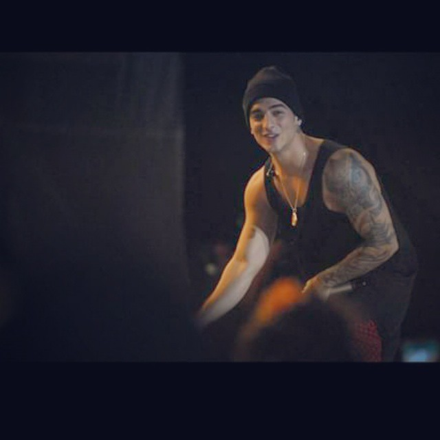 Maluma llevando a cabo un espectáculo en Puerto Cabello, Venezuela, el 17 de febrero de 2015.